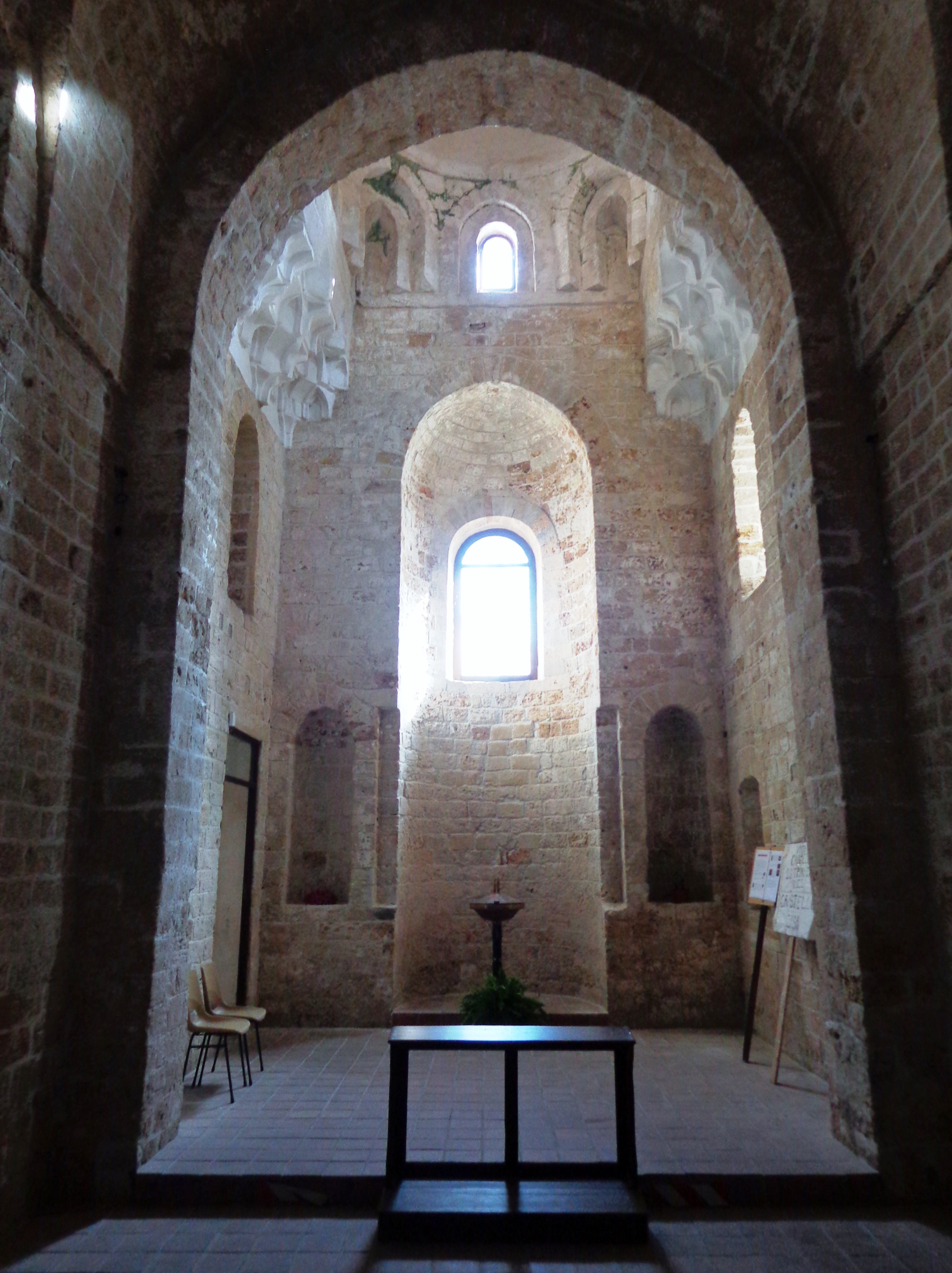 Palazzo Zisa PA 08